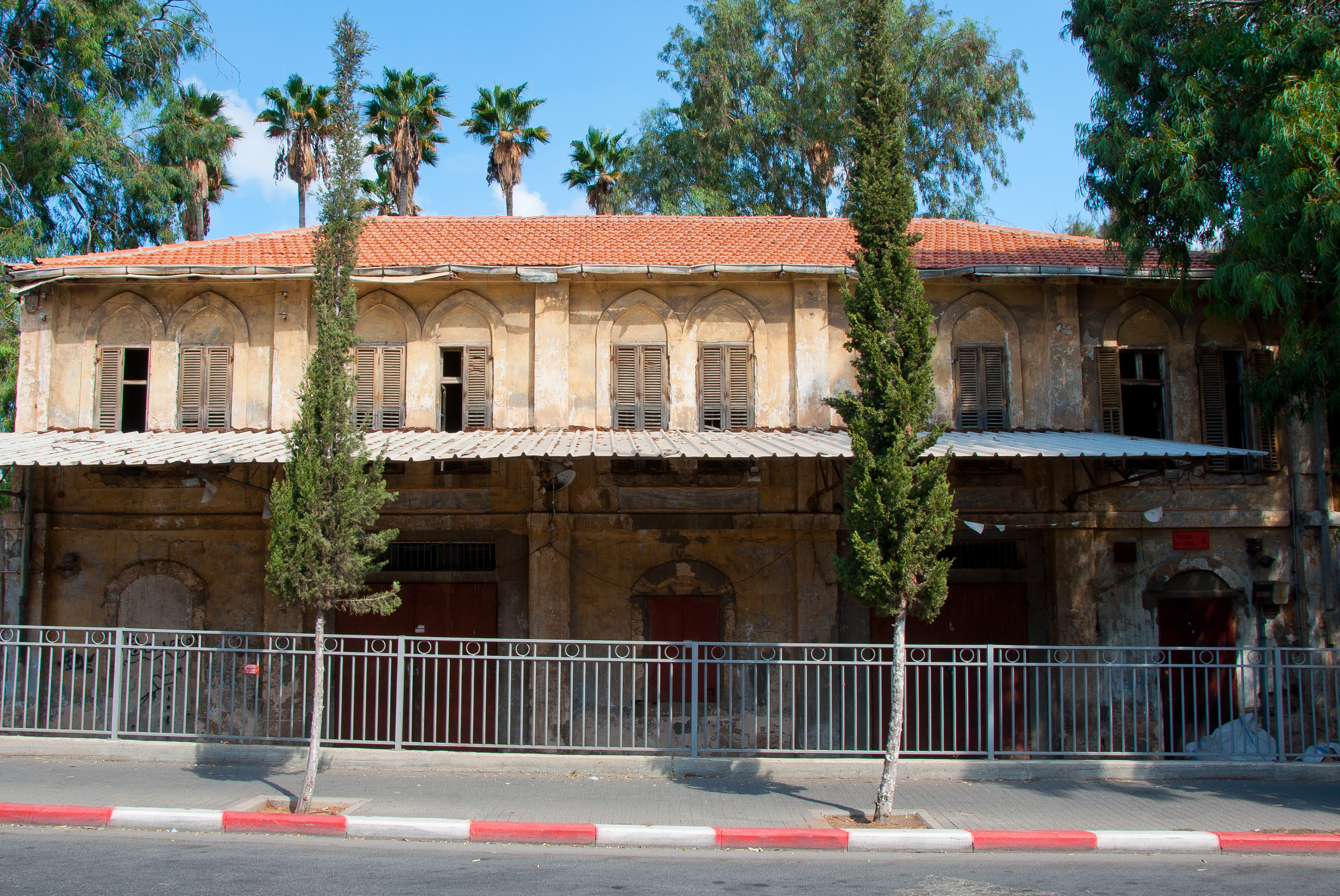 המבנה הוקם על ידי פקידות הברון ב־1888 ושירת את עובדי היקב. בשנת 1901 נפתח בקומת הקרקע של המבנה מטבח פועלים.